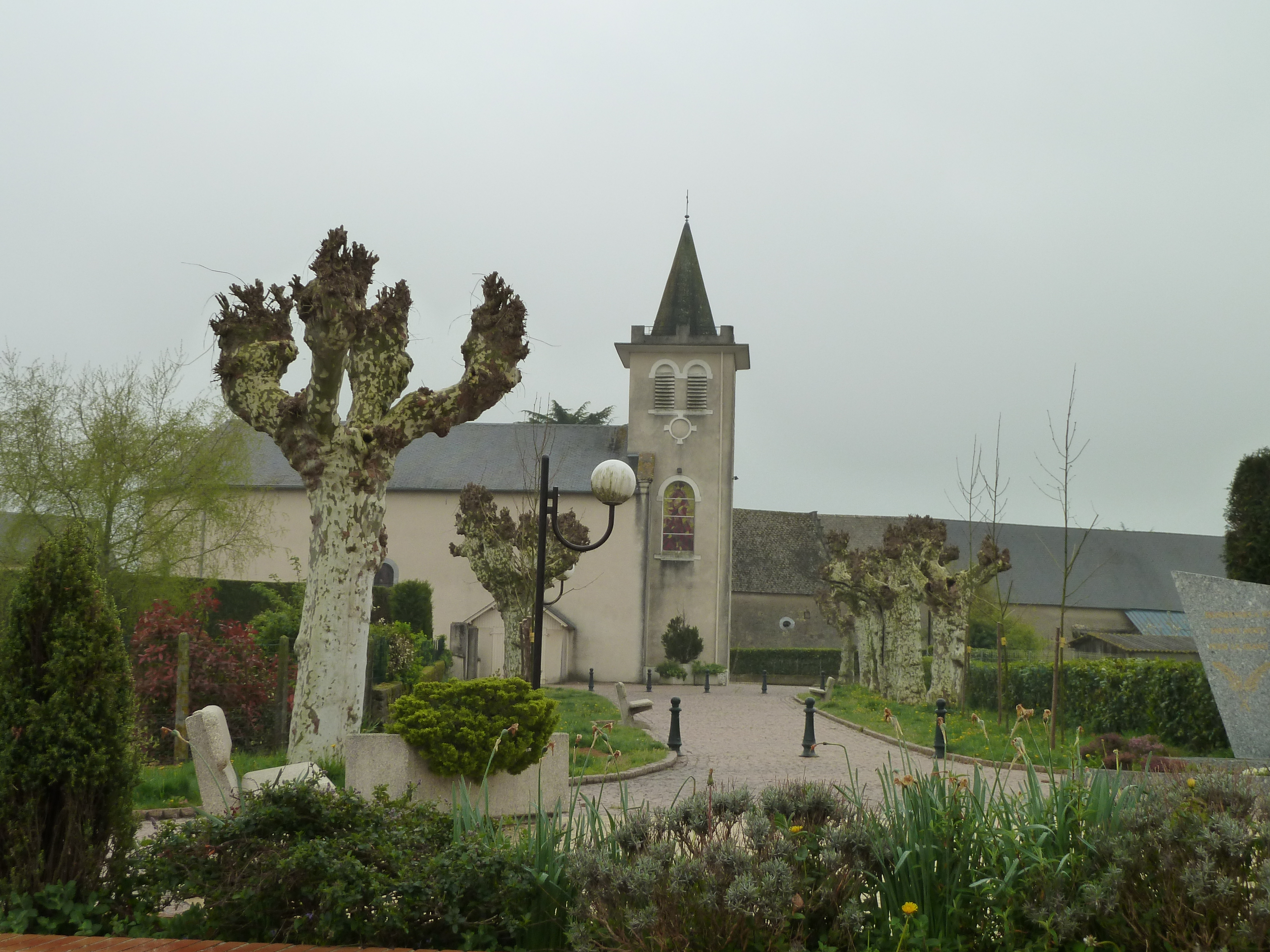 Eglise d'Eslourenties-Daban